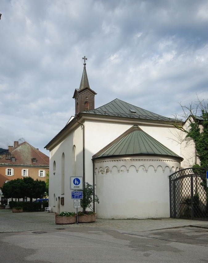 Poststr. 37, 83435 Bad Reichenhall, St. Johannes-SpitalkircheThis is a photograph of an architectural monument.